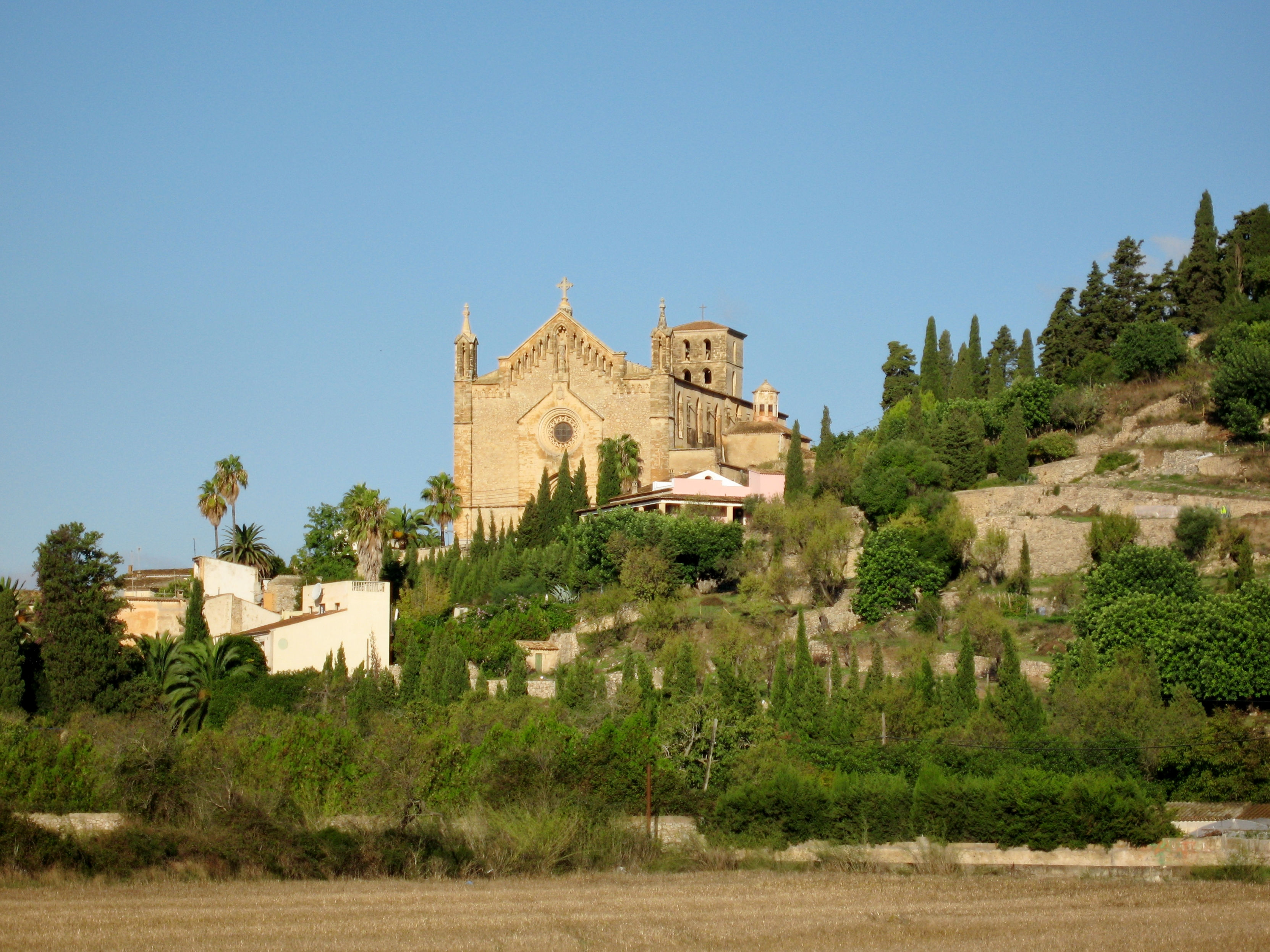 Esglèsia Parroquial, Artà, Mallorca, Spain